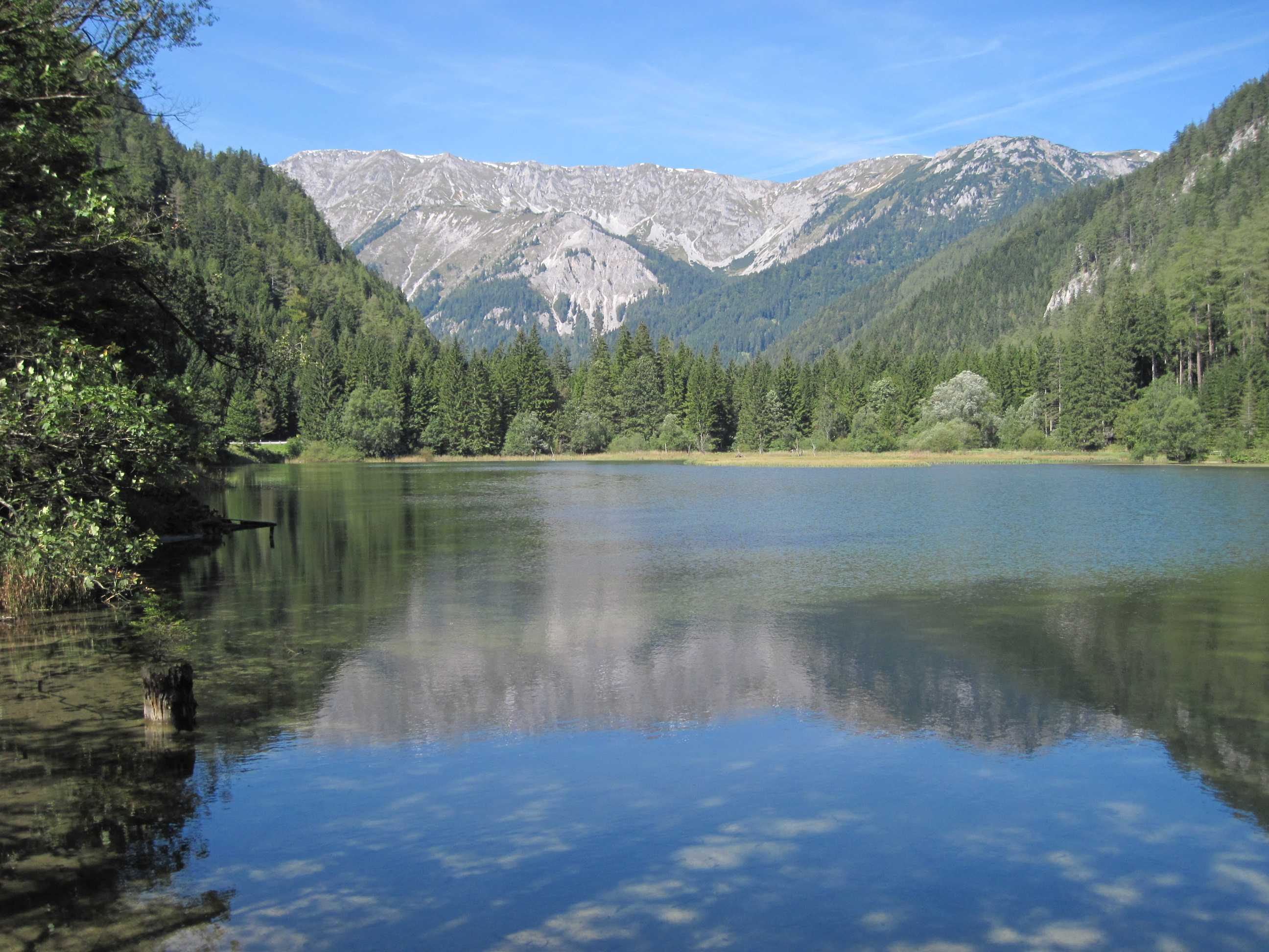 Dürrsee bei Seewiesen an der B20 zwischen Au und Seewiesen